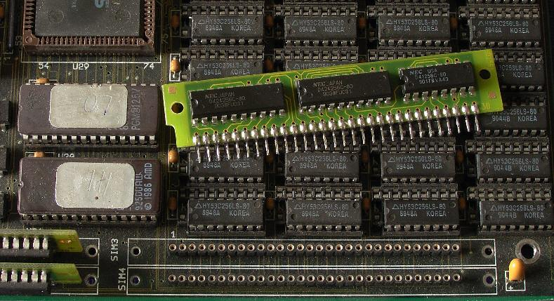 SIPP-Module und -Fassung auf einem typischen 80286-Mainboard